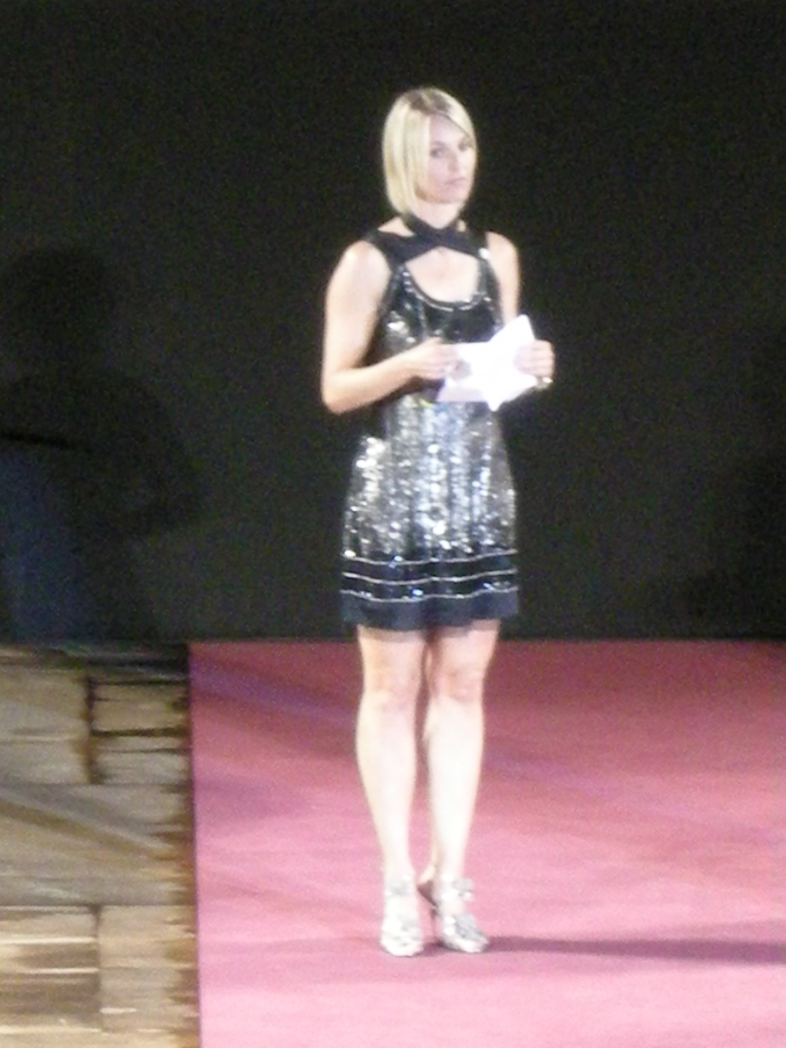 Taormina film festival 2009, ellen hiddings